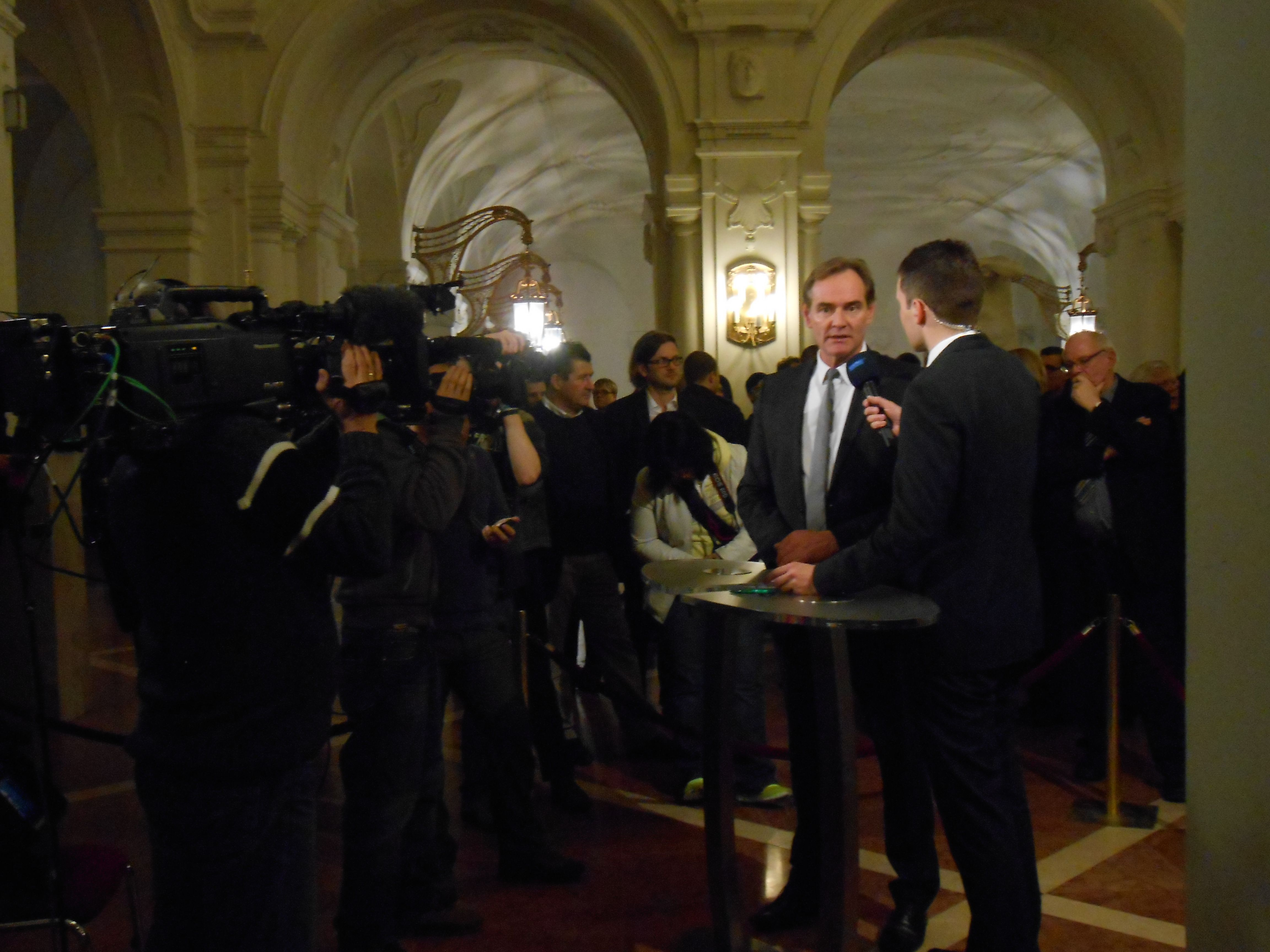 Burkhard Jung bei MDR Aktuell im Rathaus Leipzig